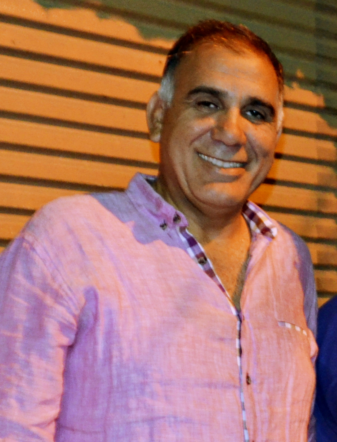 أحمد بسيوني زيد، رئيس مركز ومدينة دسوق الحالي